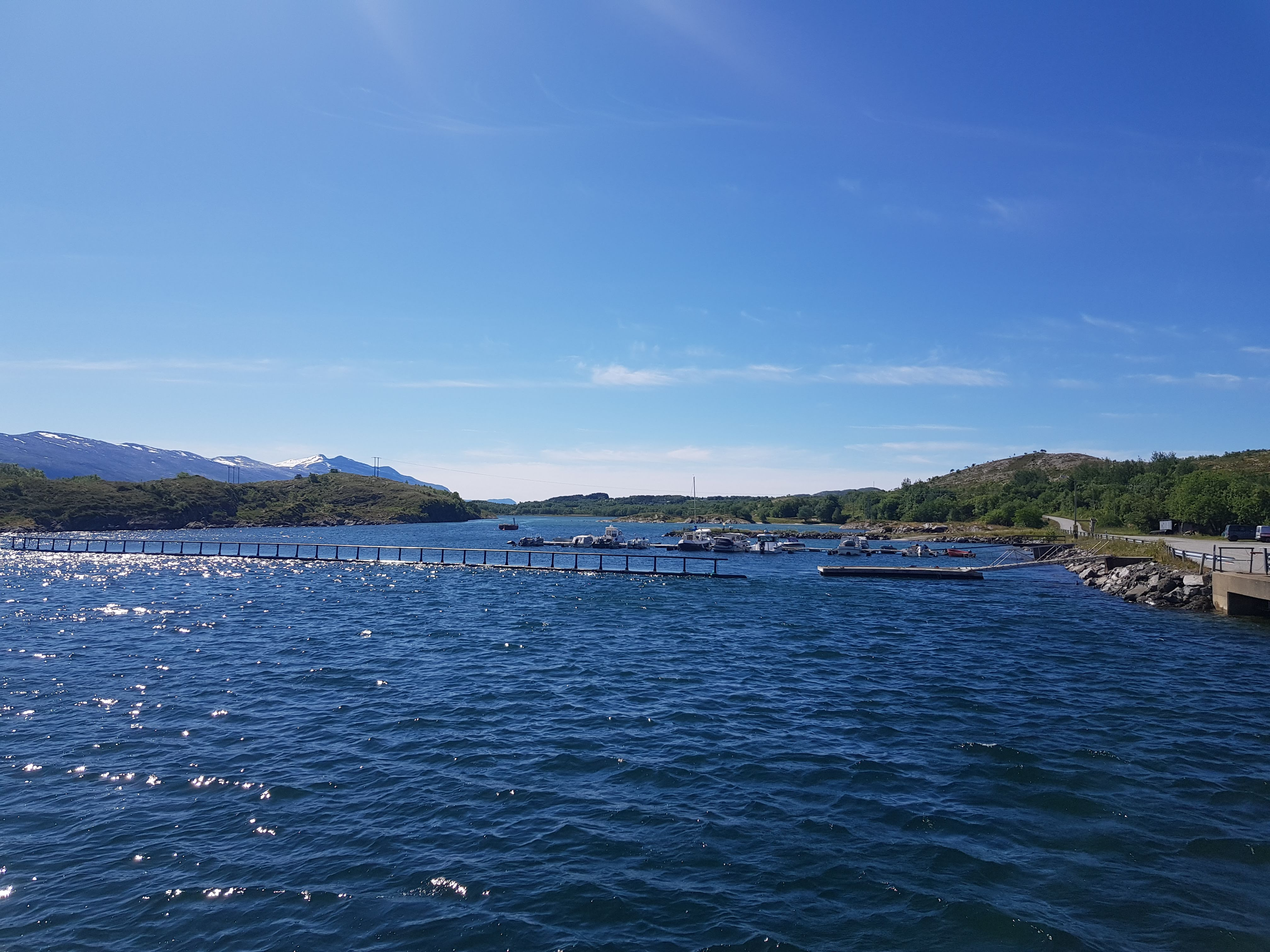 Mindlandet fotografert i sydlig retning fra fergeanløpet.